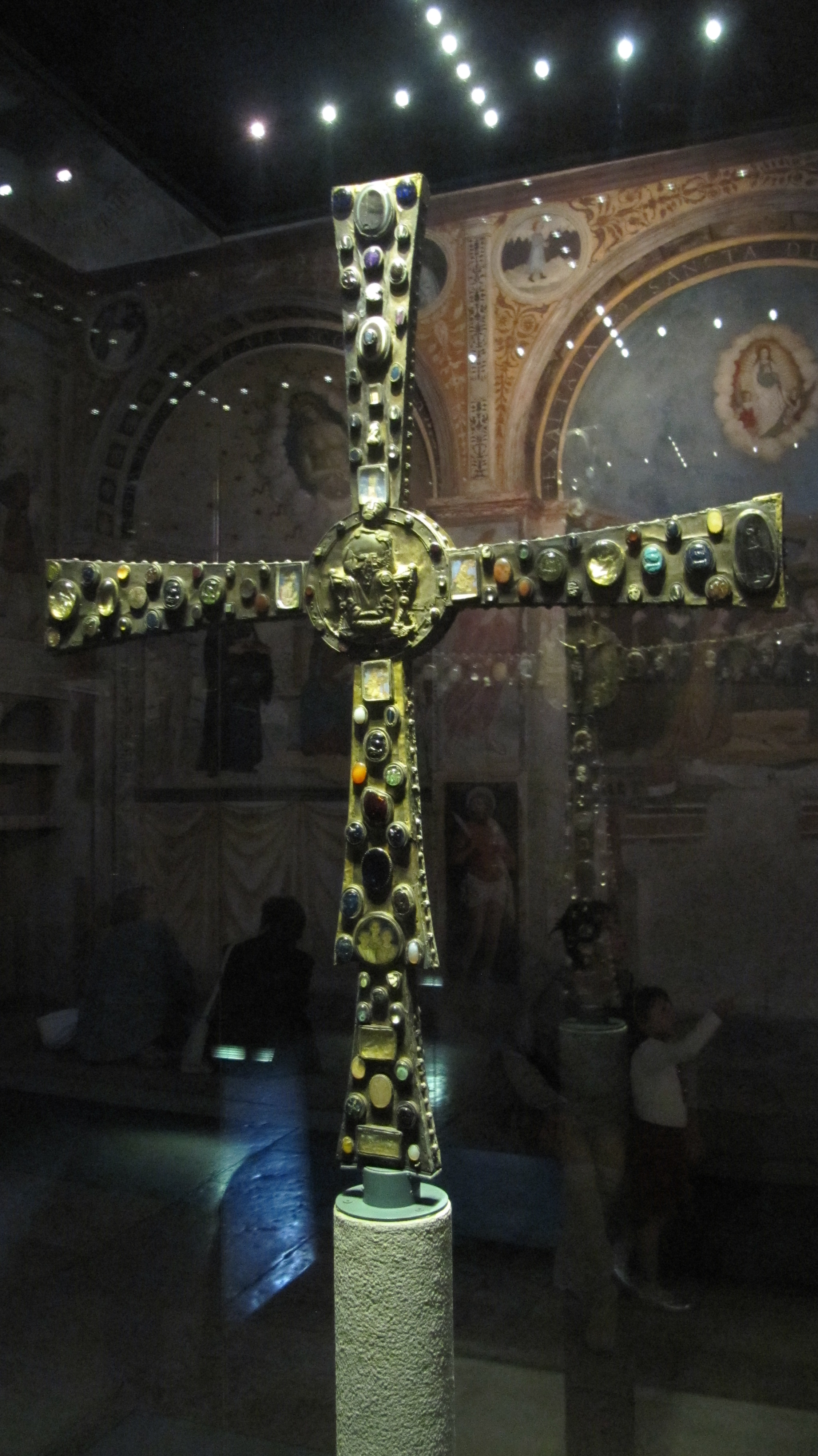 Croce di Desiderio, IX secolo, museo di Santa Giulia, Brescia